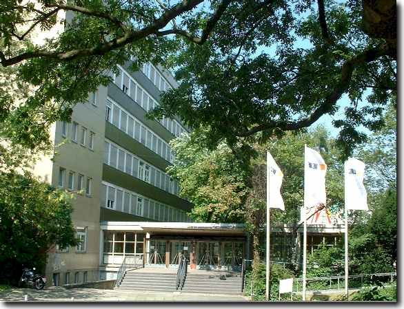 Gebäude Geschwister Scholl Str. Konrad-Klepping-Berufskolleg